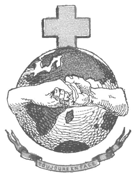 Symbole de l'Alliance anti-israélite universelle, utilisé sur une publication de la Ligue nationale anti-sémitique de France et détournant le symbole "Kol Israel Haverim" de l'Alliance israélite universelle.